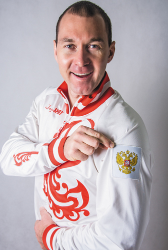 Максим Опалев. Заслуженный мастер спорта, олимпийский чемпион (Пекин, 2008) по гребле на каноэ. Многократный чемпион мира, Европы, России. Фотография из серии «Лица эстафеты».